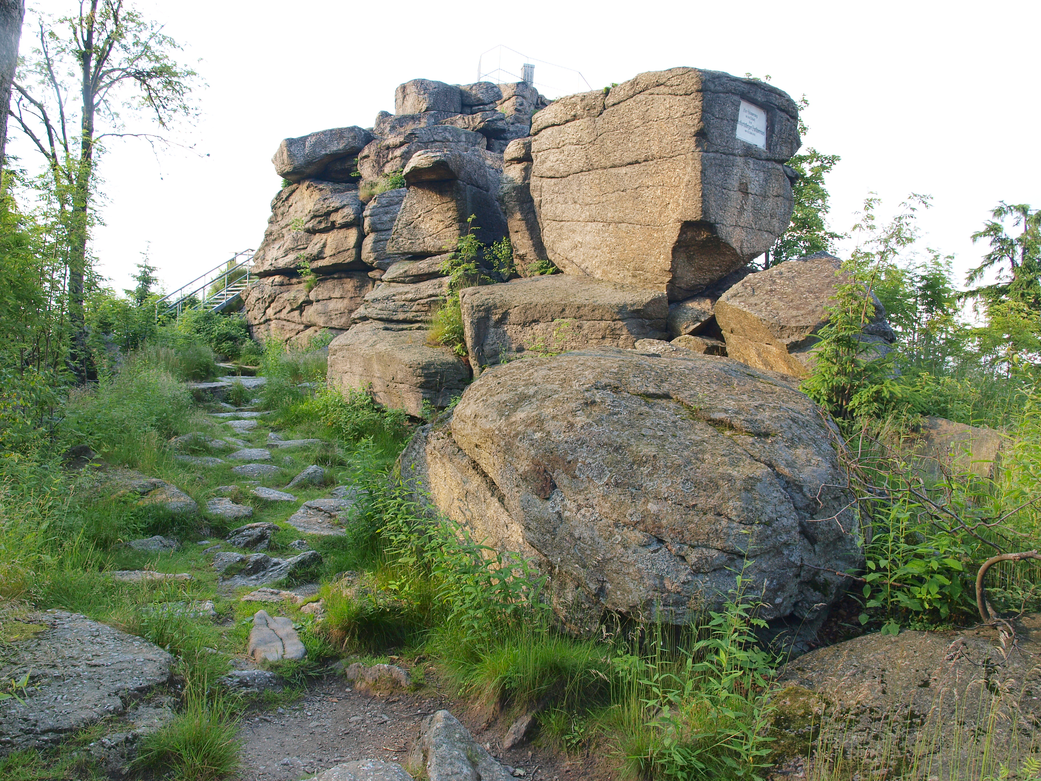 Nebelstein je hora Rakouska s přírodní rozhlednou, vzdálená od státní hranice s ČR asi 5 km. Nachází se na rakouské straně Novohradských hor.